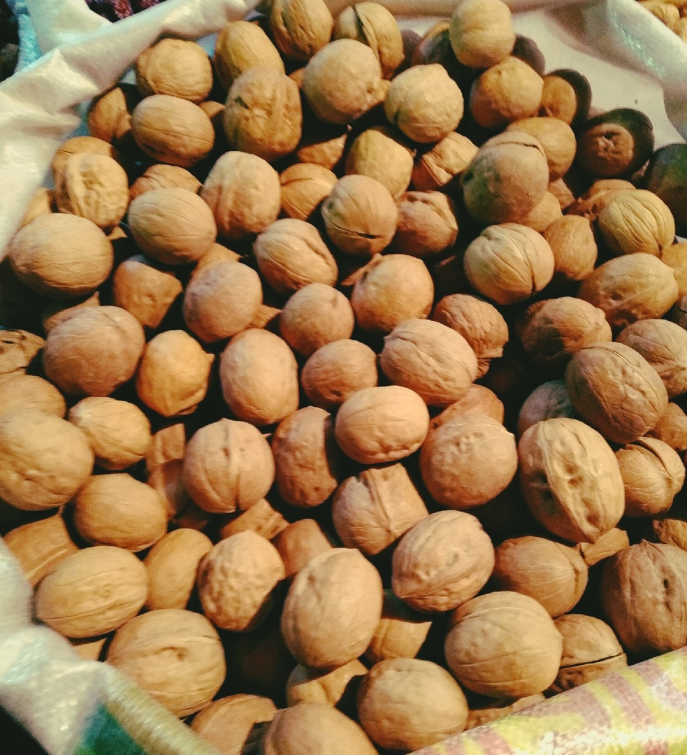 Татарча/tatarça: Греция чикләвеге. Рәсем 2019 елда эшләнгән.